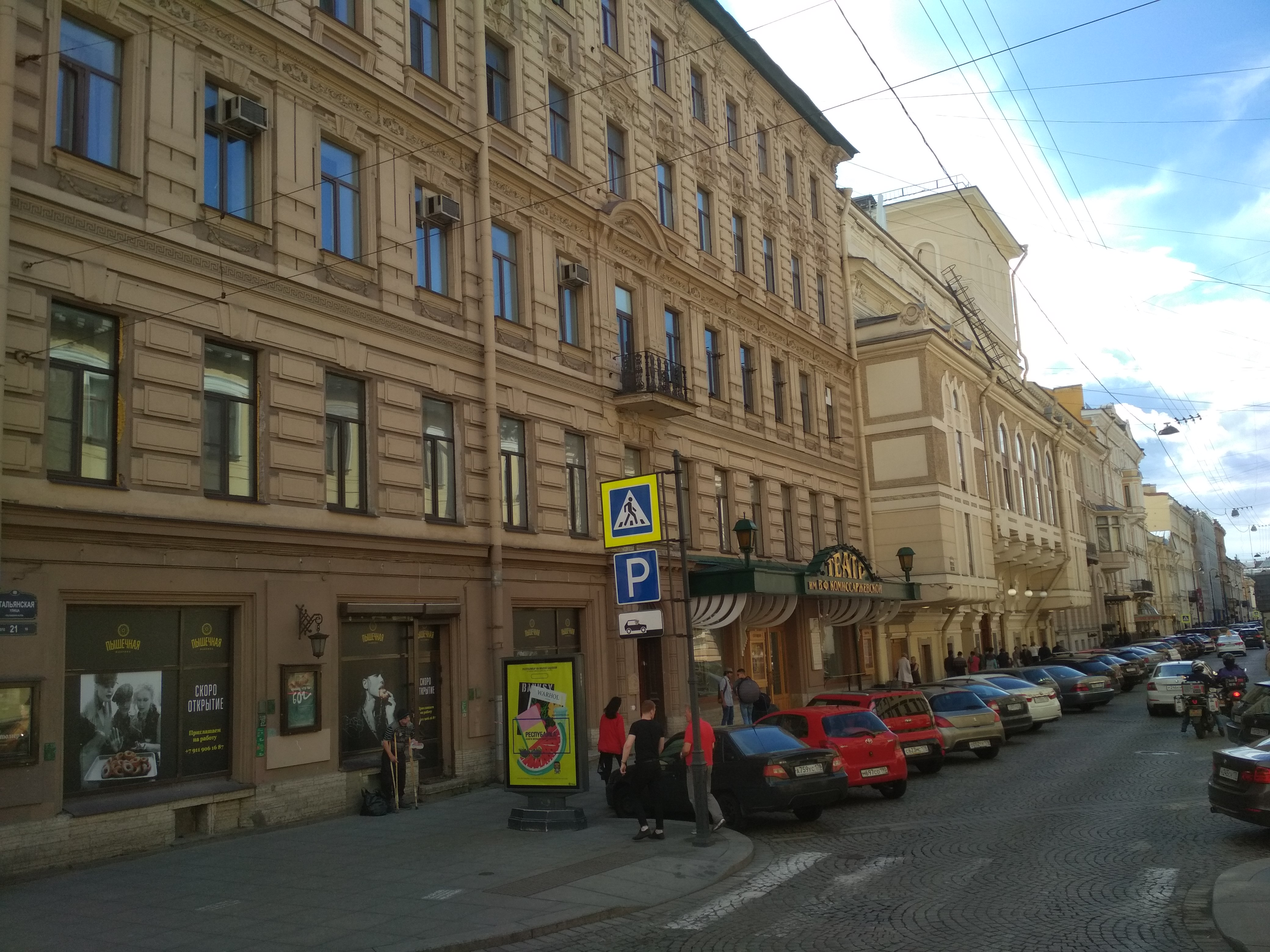 Театр Комиссаржевской (Итальянская ул.) в 2018 году